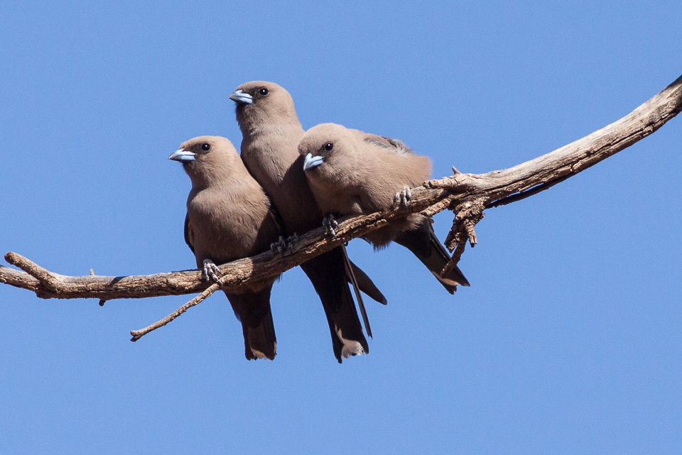 Flinder's Range National Park